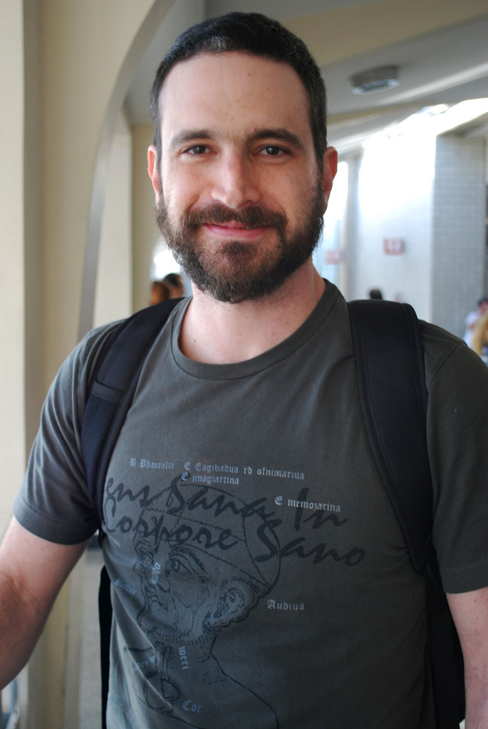 Caco Ciocler no Aeroporto de Congonhas, São Paulo.